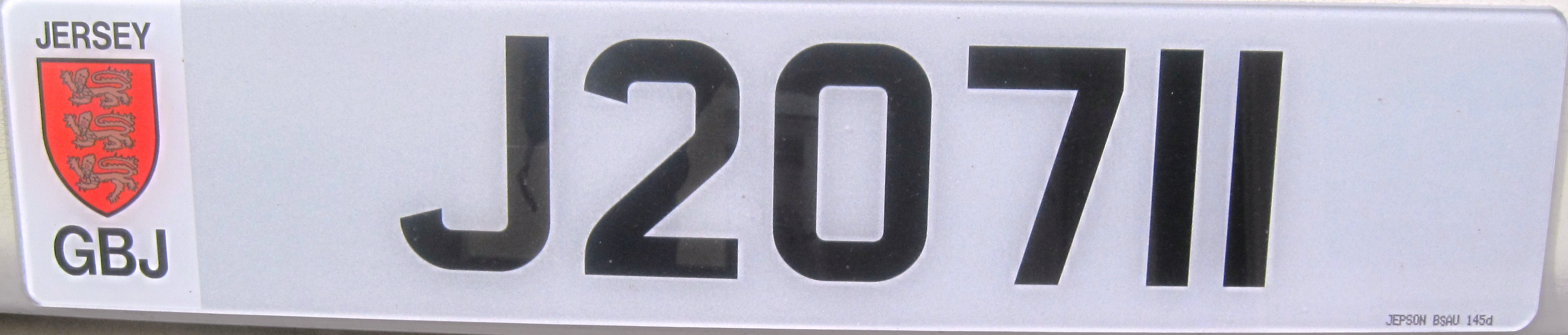 kentekenplaat Jersey voor